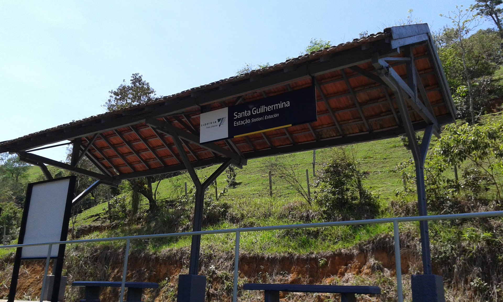 Reabertura da estação Parada Santa Guilhermina depois de 7 anos fechada. Foto: Luíz Felipe Lopes Dias.